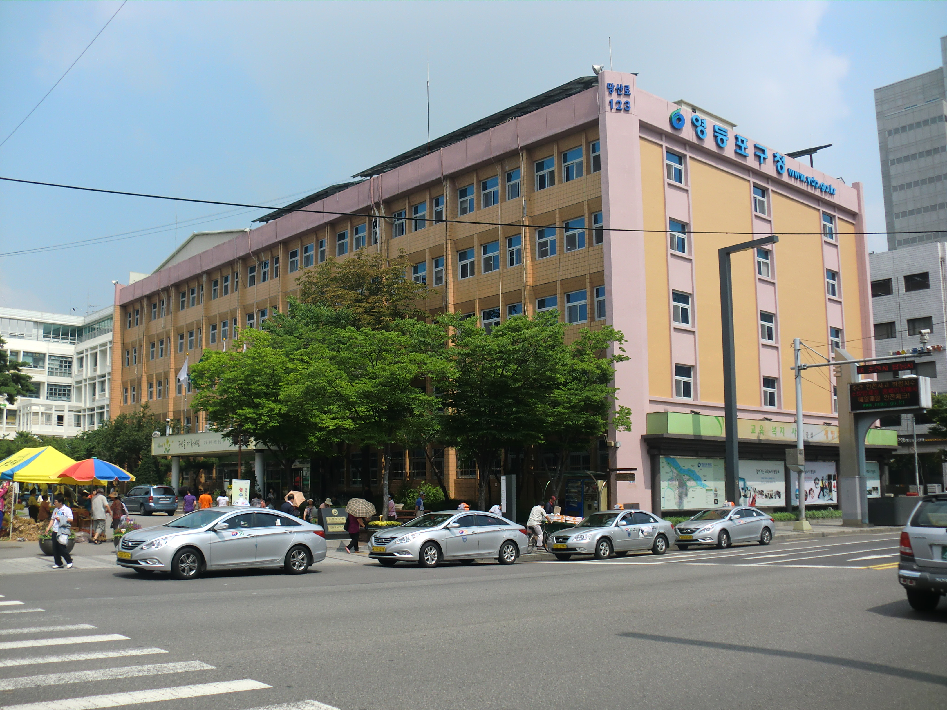 서울특별시 영등포구에 있는 영등포구청